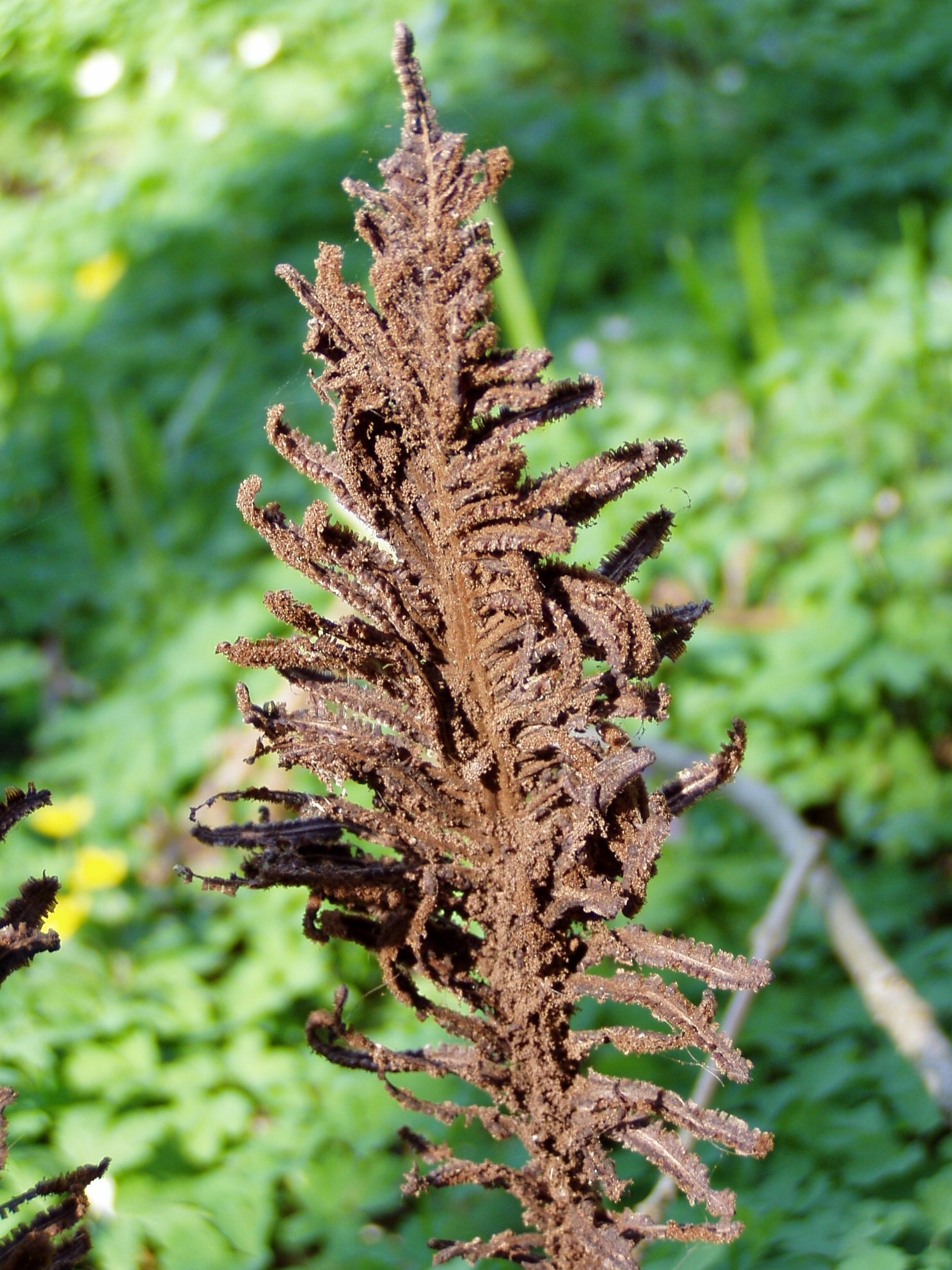 Matteuccia strutiopteris, sporophyll detail